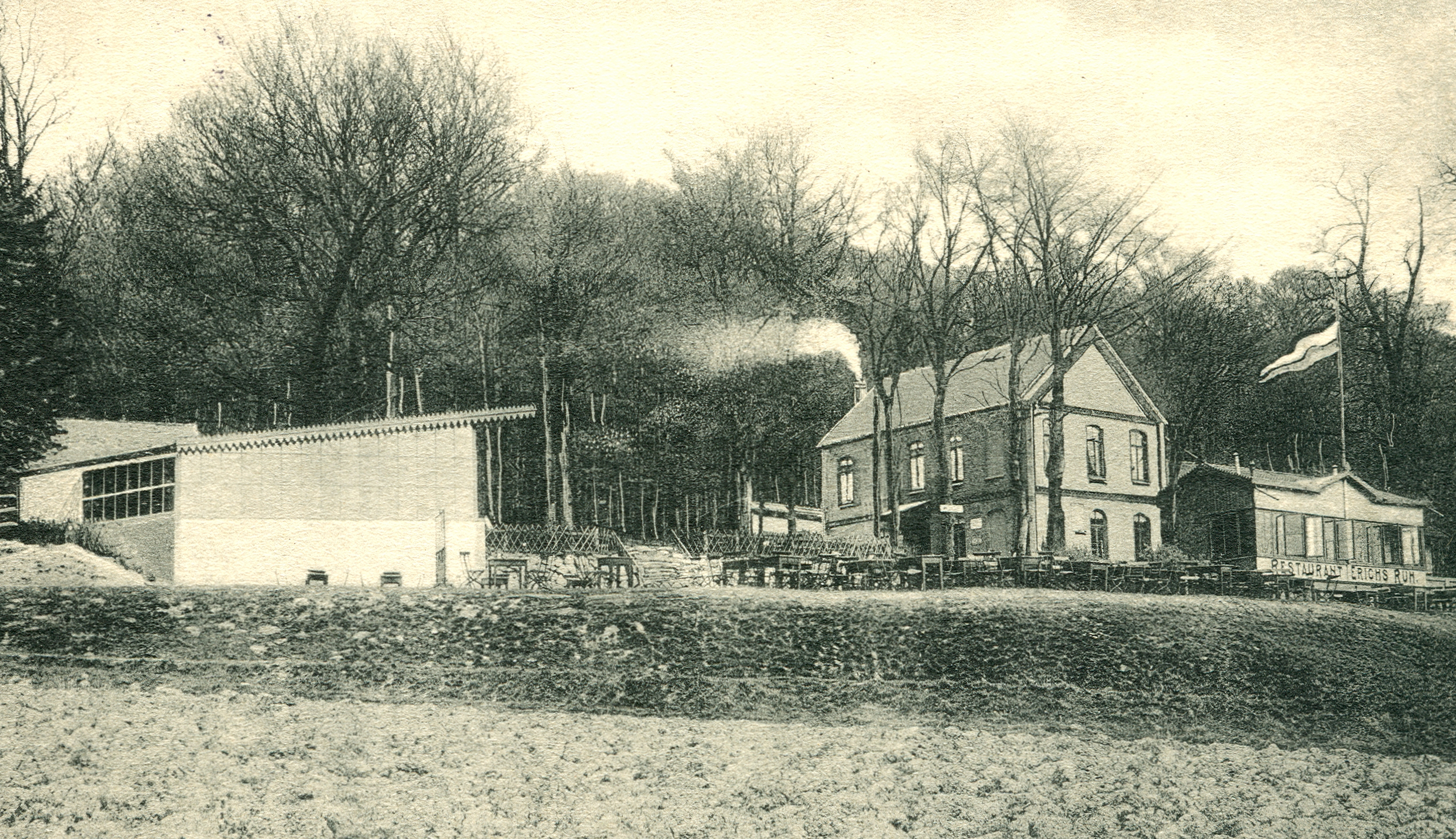 Ansichtskarte ohne Nummer von Ludwig Hemmer. Zu sehen ist das Ausflugsrestaurant "Erichs Ruh" am Benther Berg bei Benthe, hier offensichtlich in den Wintermonaten.